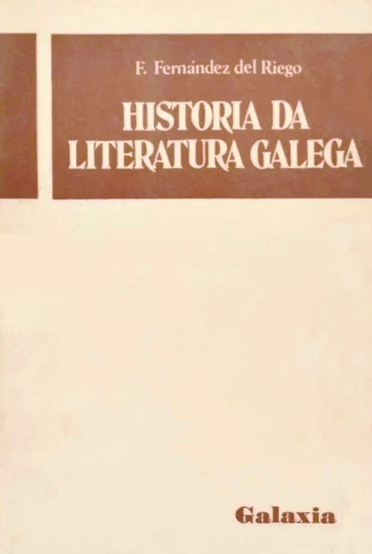 Historia da literatura galega.